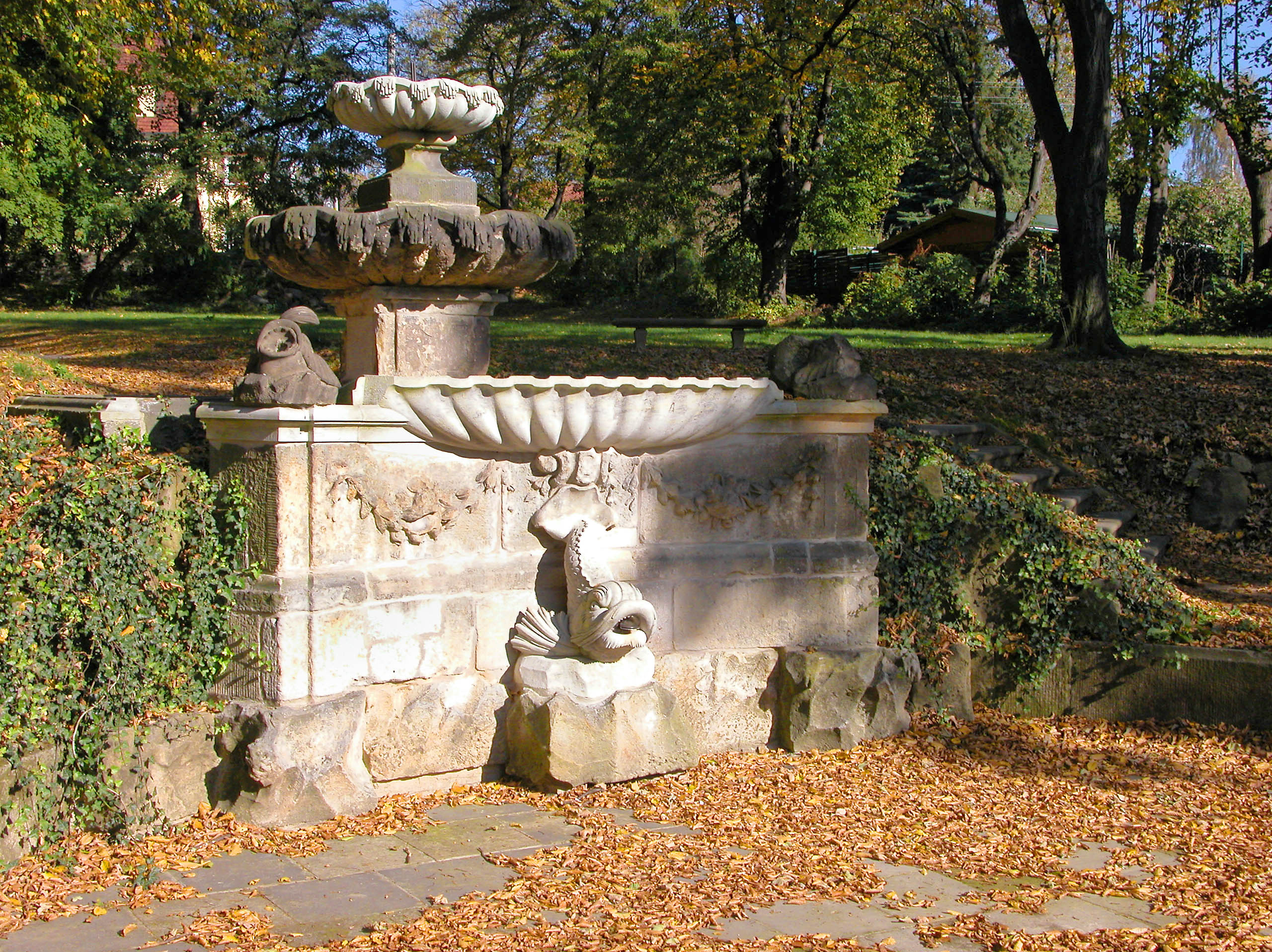 19.10.2005 01328 Dresden-Gönnsdorf: Schloßpark Gönnsdorf mit dem Barockbrunnen (GMP 51.049692,13.866628 ). 1721 kaufte die Familie von Manteuffel das Rittergut Gönnsdorf. Agnes von Manteuffel nahm sich sofort des verwahrlosten Anwesens an. Sie ließ den Herrensitz architektonisch und landschaftsgärtnerisch umbauen. Ihr Ziel war ein kleines Schloß mit anschließendem Park im Stil der regelmäßigen geometrischen Kompositionsprinzipien des französischen Lustgartens. August der Starke (1670-1733) war Duz-Bruder ihres Gatten Ernst Christop von Manteuffel und so wurde ihr Landsitz zu einem häufig vom Dresdner Hof aufgesuchtem Haus. Die Brunnenanlage im Park entstand im Zuge dieser barocken Umgestaltung (also nach 1721) durch den Hofbildhauer Francois Condray (der auch der Schöpfer des Delpinbrunnens auf der Brühlschen Terrasse war). [DSCN7861.TIF]20051019090DR.JPG(c)Blobelt